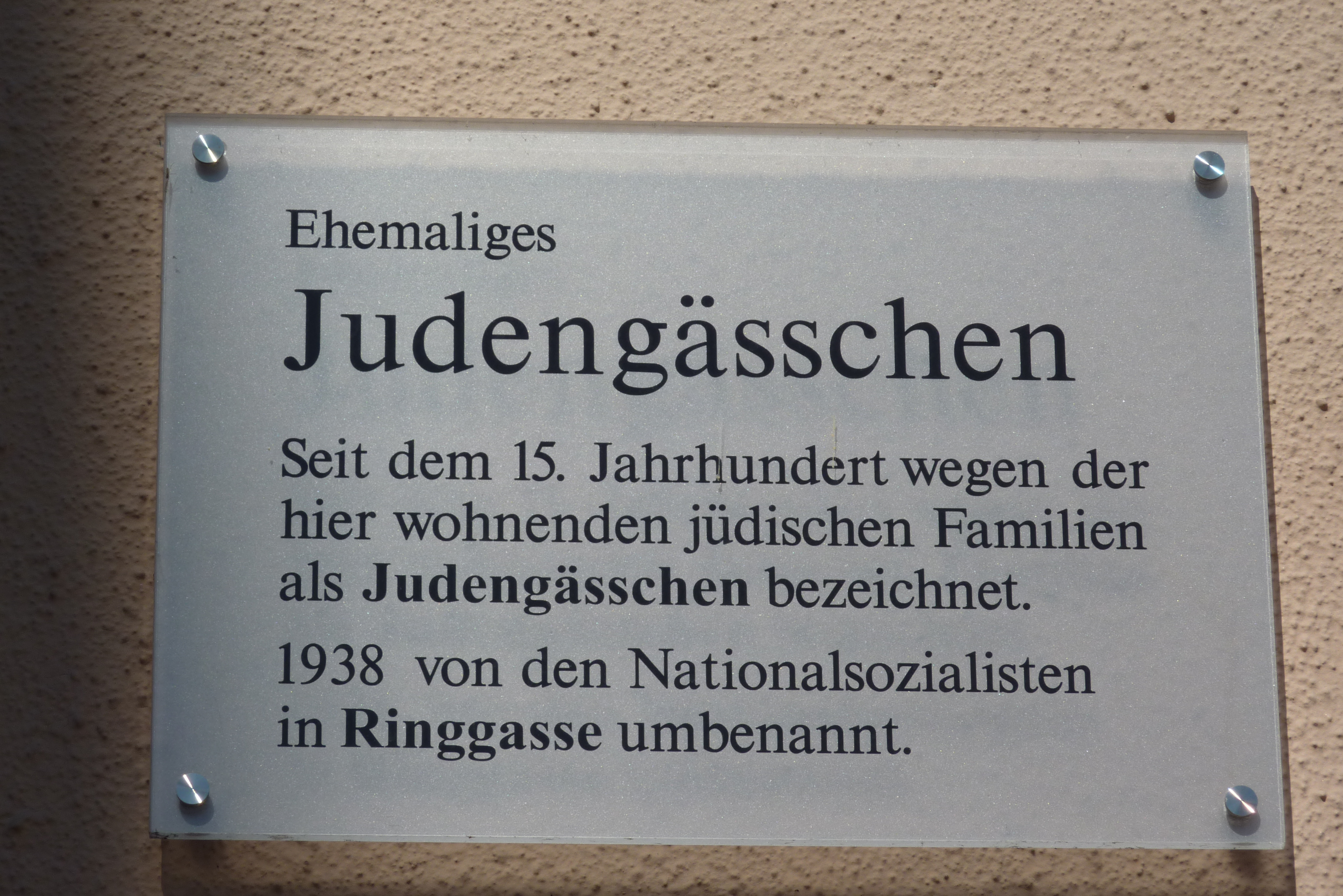 Infotafel in der Ringgasse 5 in Oettingen in Bayern, ehemaliges Judengässchen